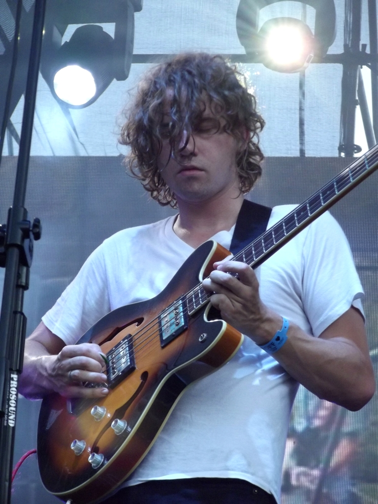 Zdjęcie zrobione podczas OFF Festival 2013 w katowickiej Dolinie Trzech Stawów.